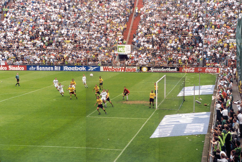 Bökelberg - Szene aus einem Spiel gegen Borussia Dortmund